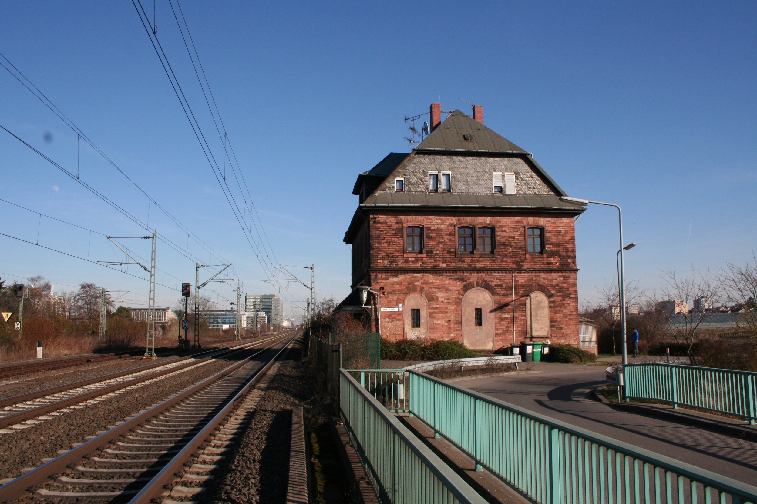 Das Gebäude des stillgelegten Bahnhofs des Stadtteils Oberrad von Frankfurt am Main. The building of the disused railway station of Frankfurt am Main's district Oberrad.